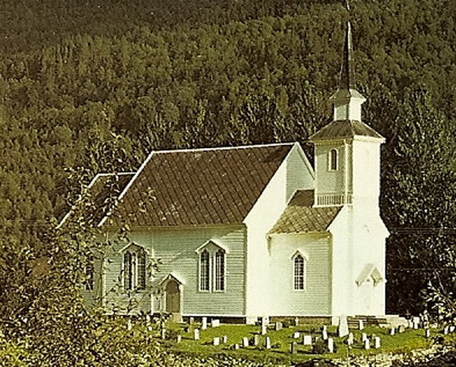 Nedstryn kirke